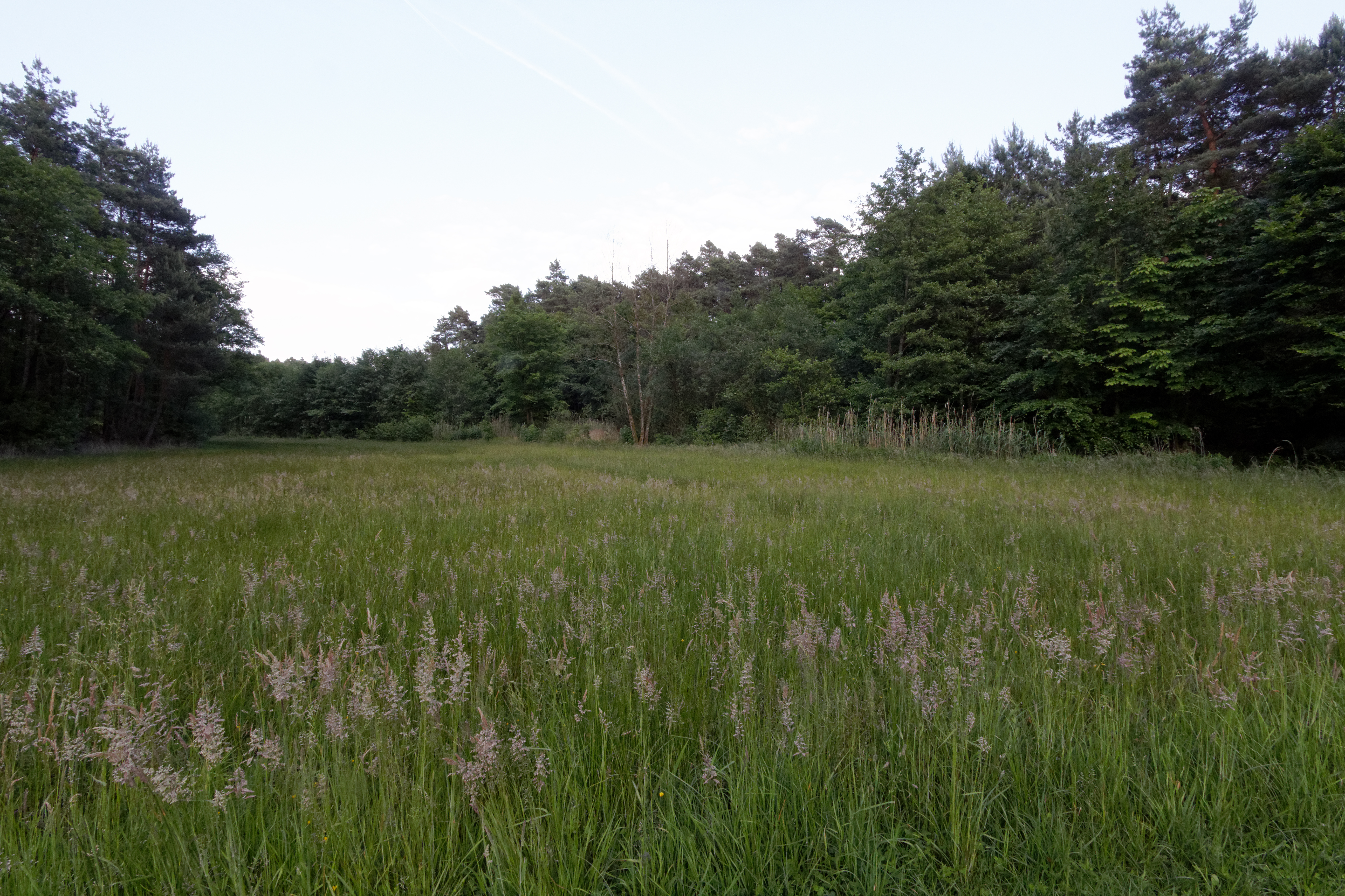 Wiesenzug des Naturschutzgebiets „Niederrodener Lache“ bei Rodgau (Hessen).